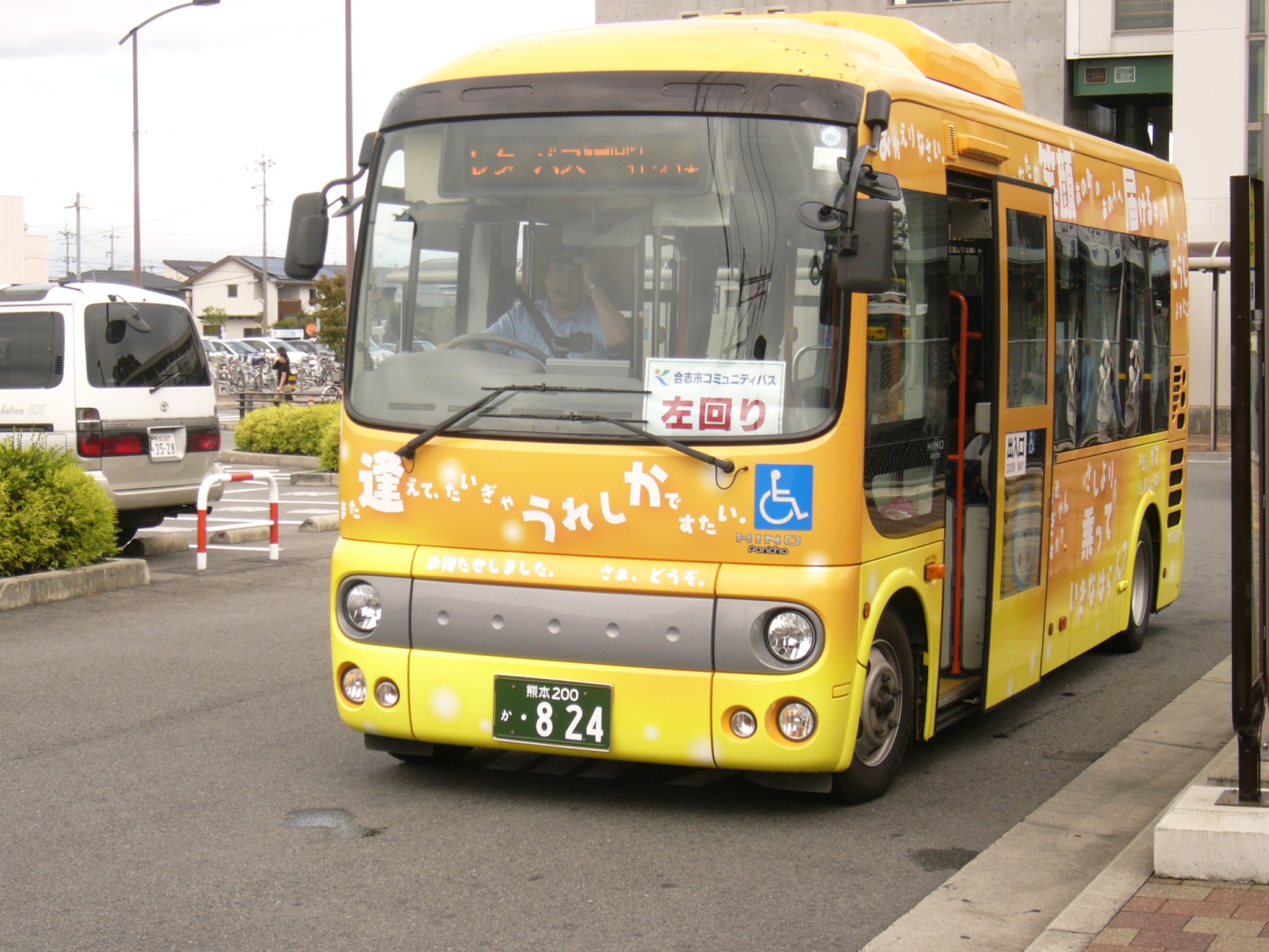 熊本電気鉄道（レターバス）